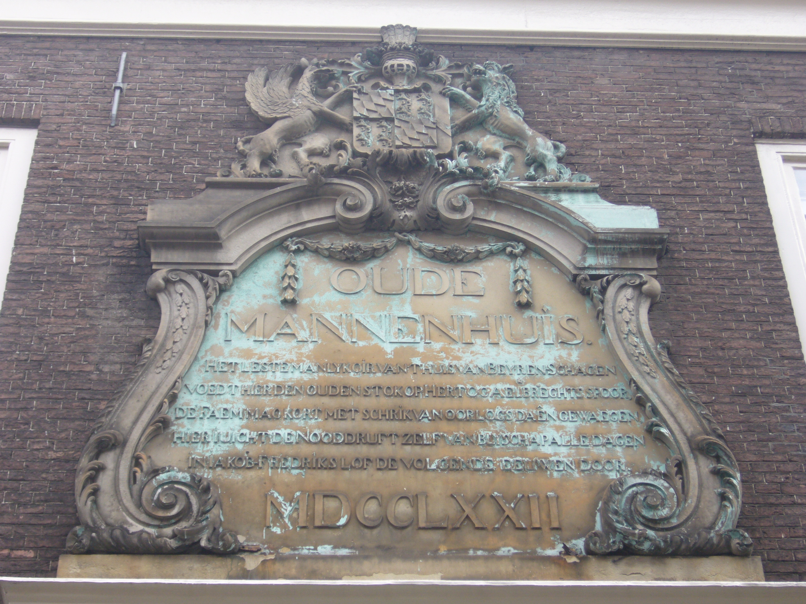 Oude Molstraat 25, detail van gevel van het Oude Mannenhuis